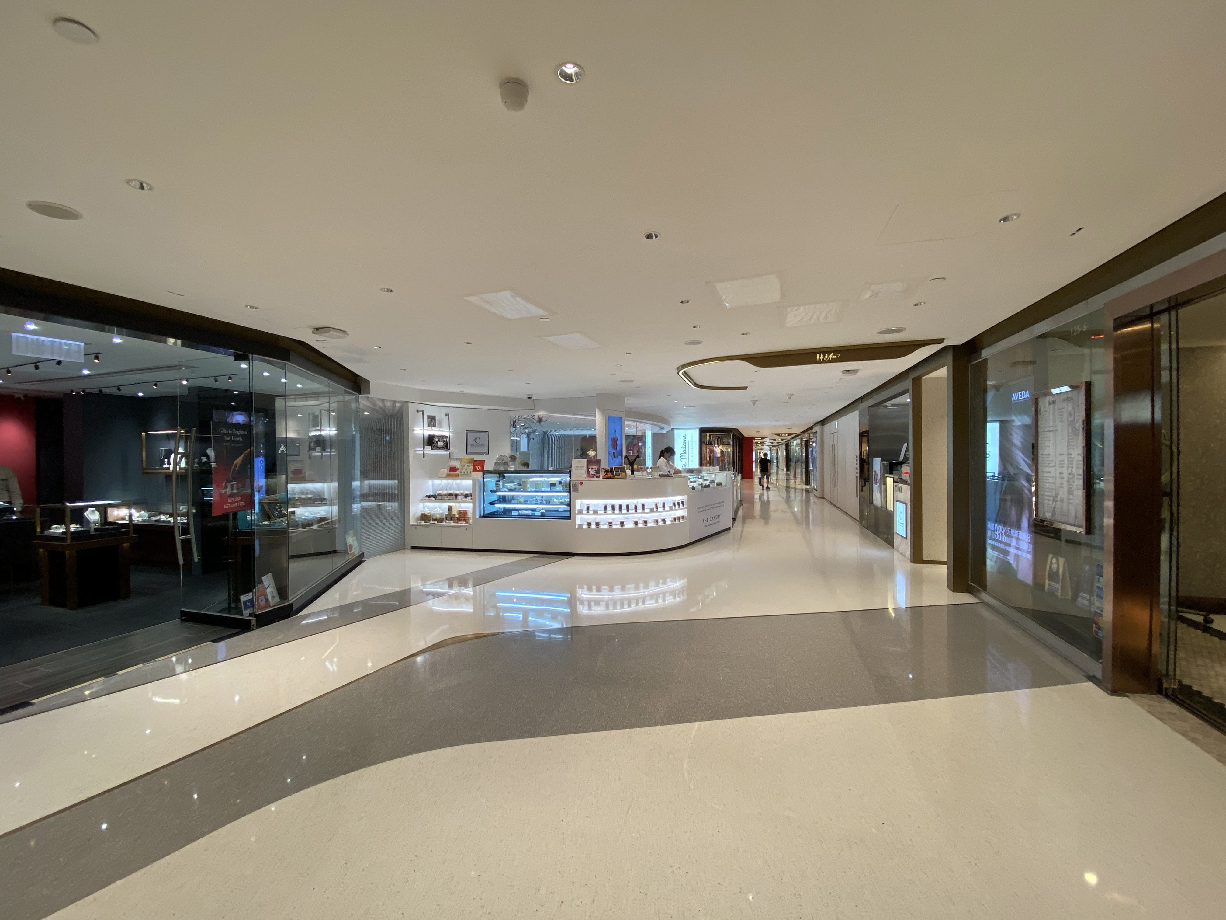 Lee Garden Two Level 1